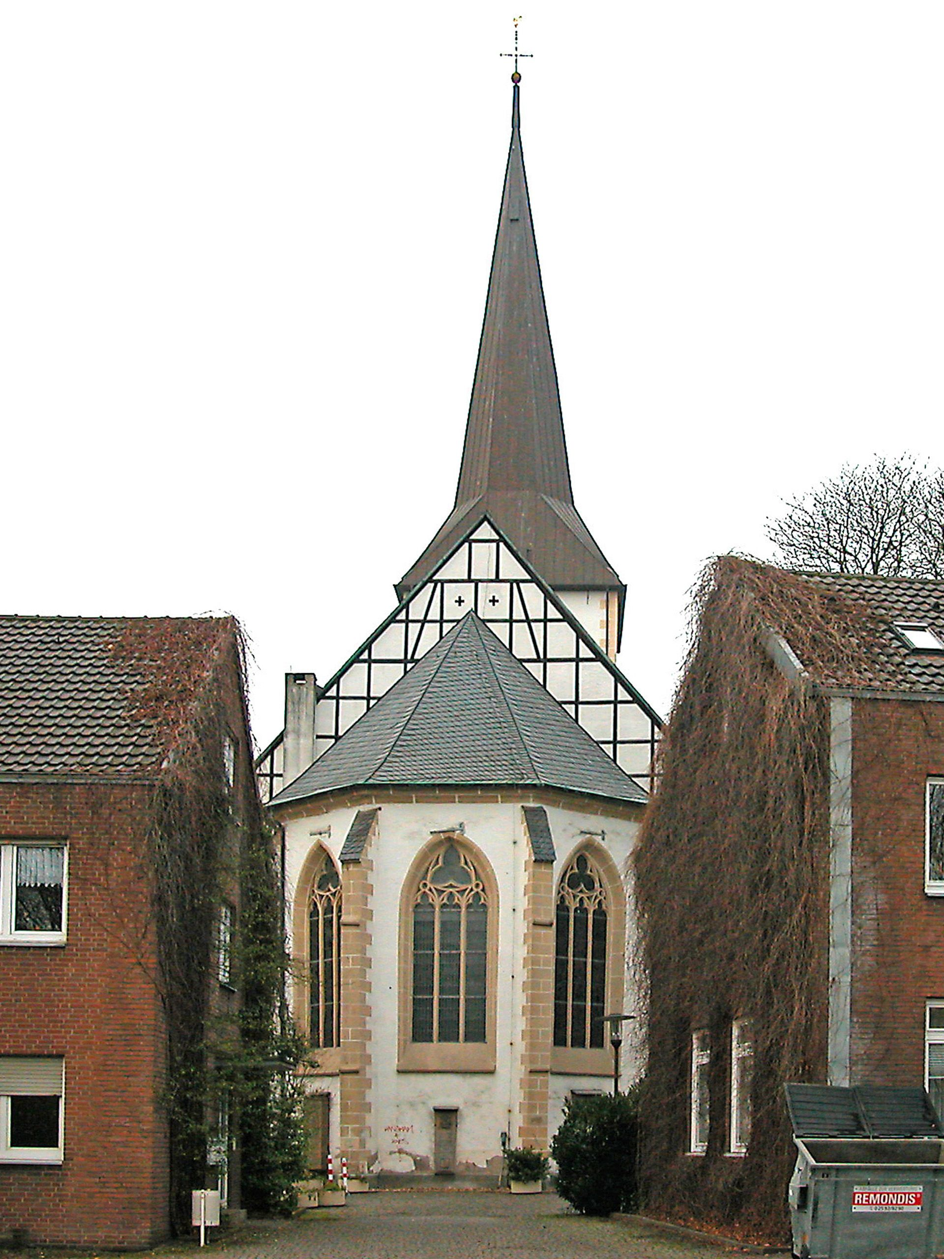 Stadtkirche St. Georg. Luenen (de); Церковь св. Георга. Люнен (ru).